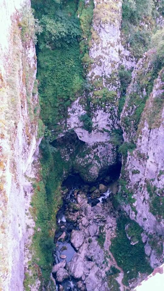 Srpski (latinica): Kanjon Nevidio na obroncima Durmitora.